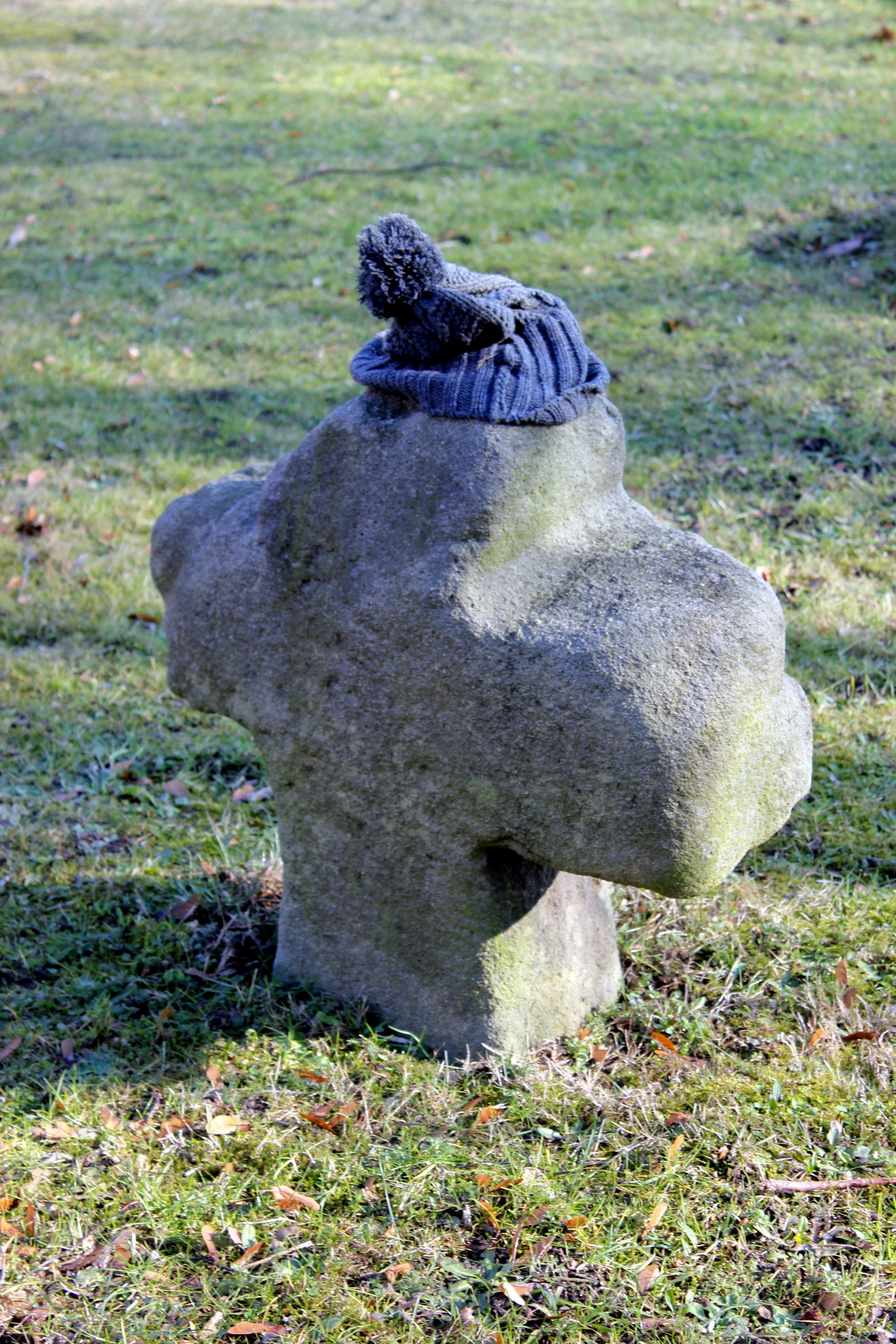 Hornjoserbsce: Pěskecy; kamjentny križ.